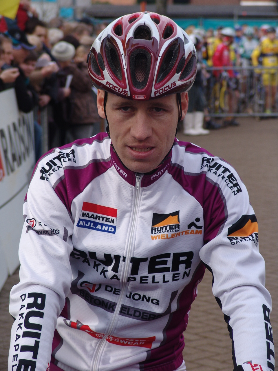 Maarten Nijland , Renner van team ruiter dakkappelen